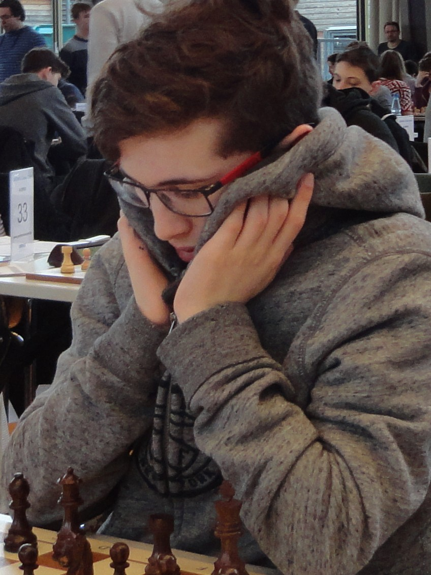 Bilel Bellahcene, Grenke Chess Open 2016 in Karlsruhe.